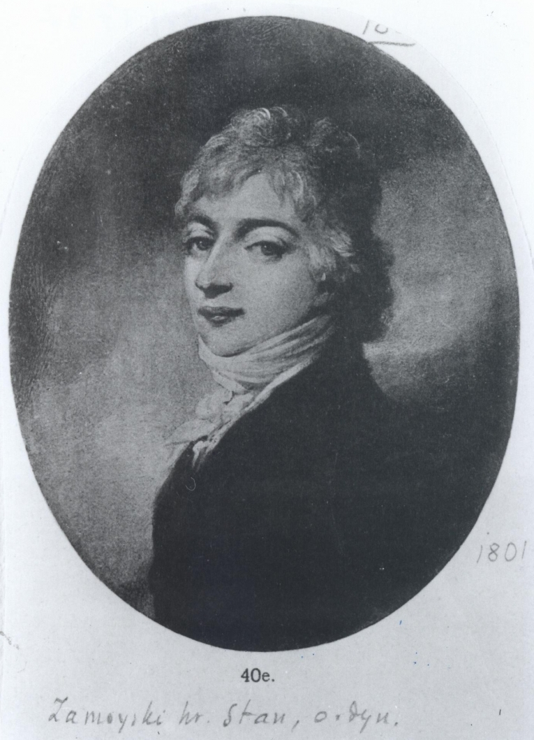 Portrait of Stanisława Kostki Zamoyskiego